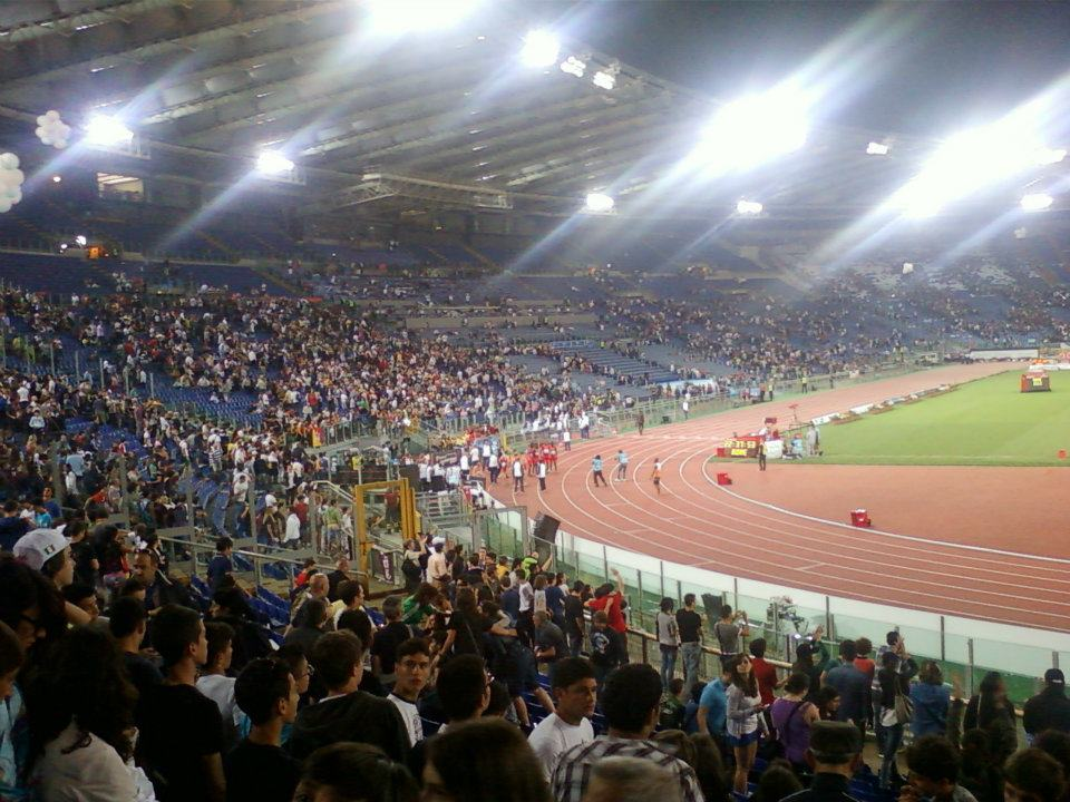 manifestazione roma